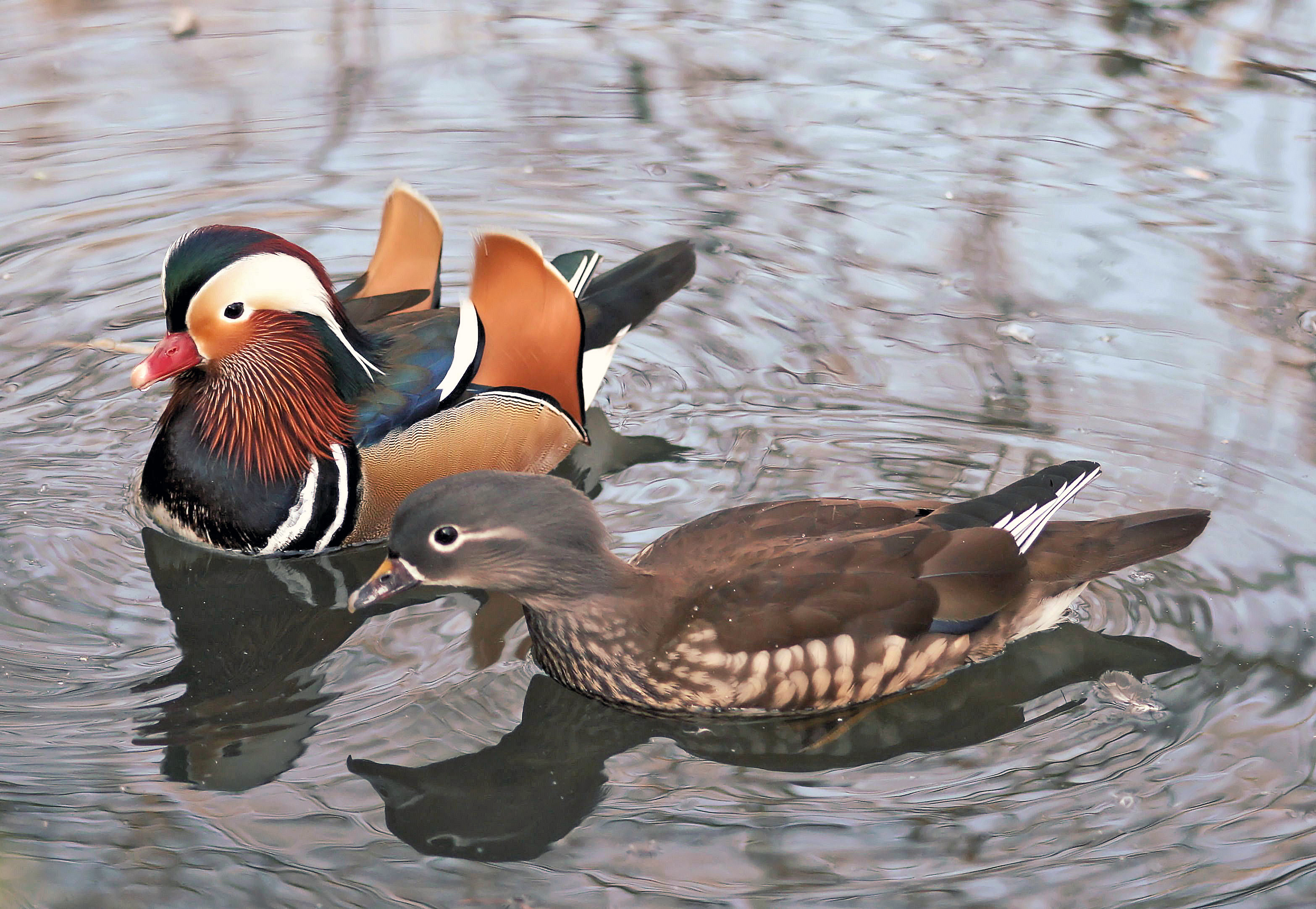 Mandarinentenpärchen im Karlsruher Zoo